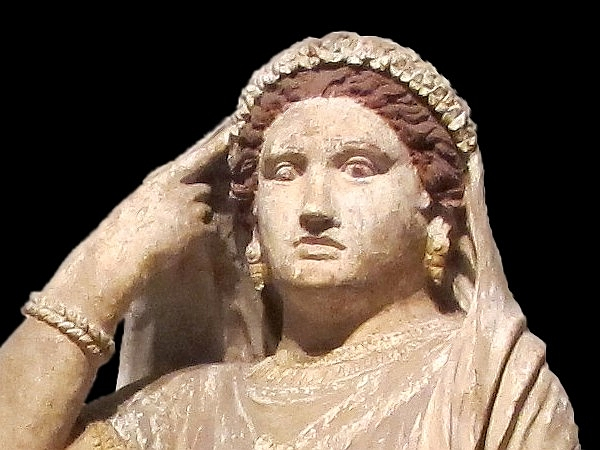 Museo archeologico nazionale (Firenze)